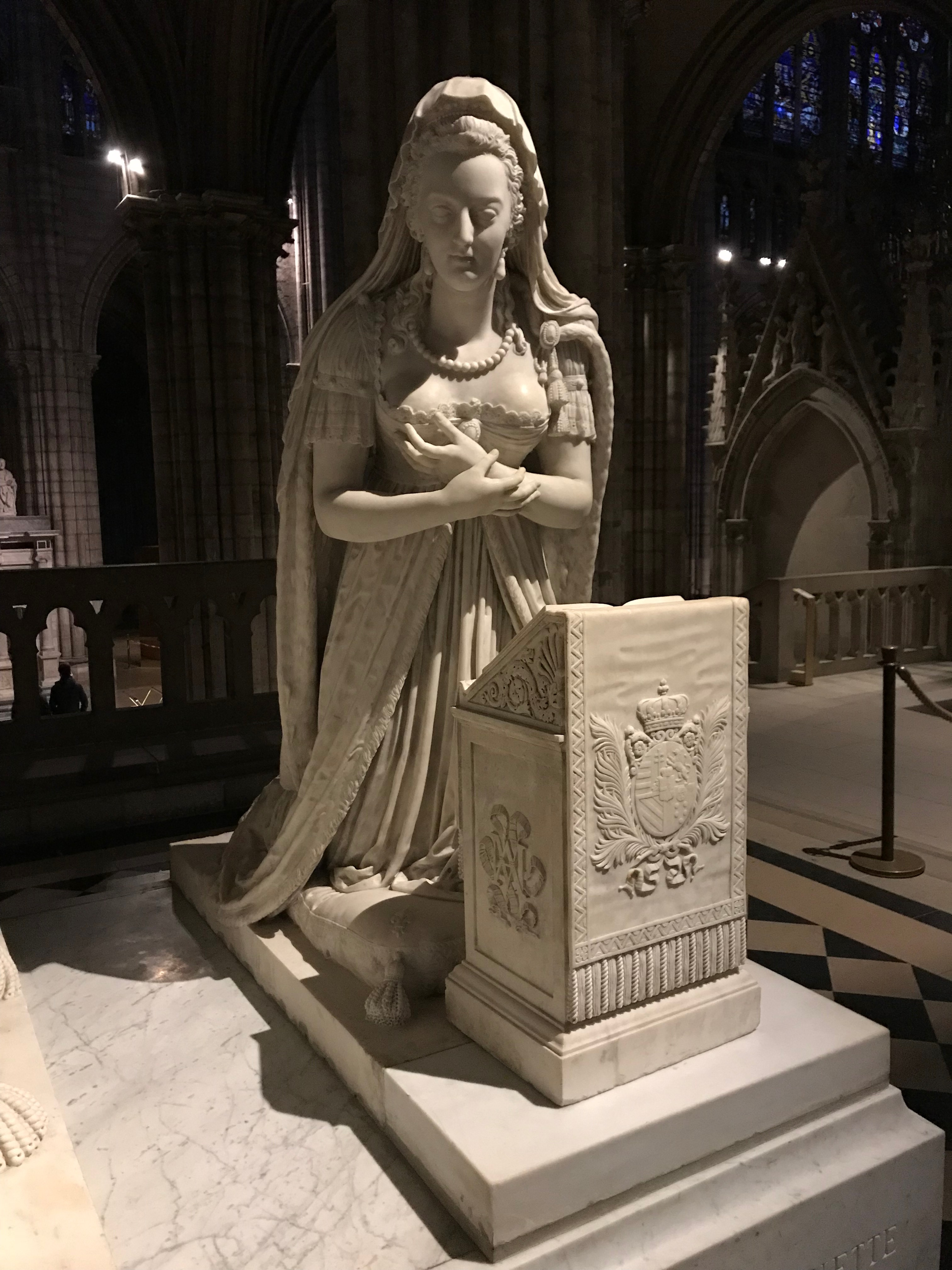 Monument funéraire de Louis XVI et de Marie-Antoinette, Basilique Saint-Denis, Saint-Denis, Seine-Saint-Denis.